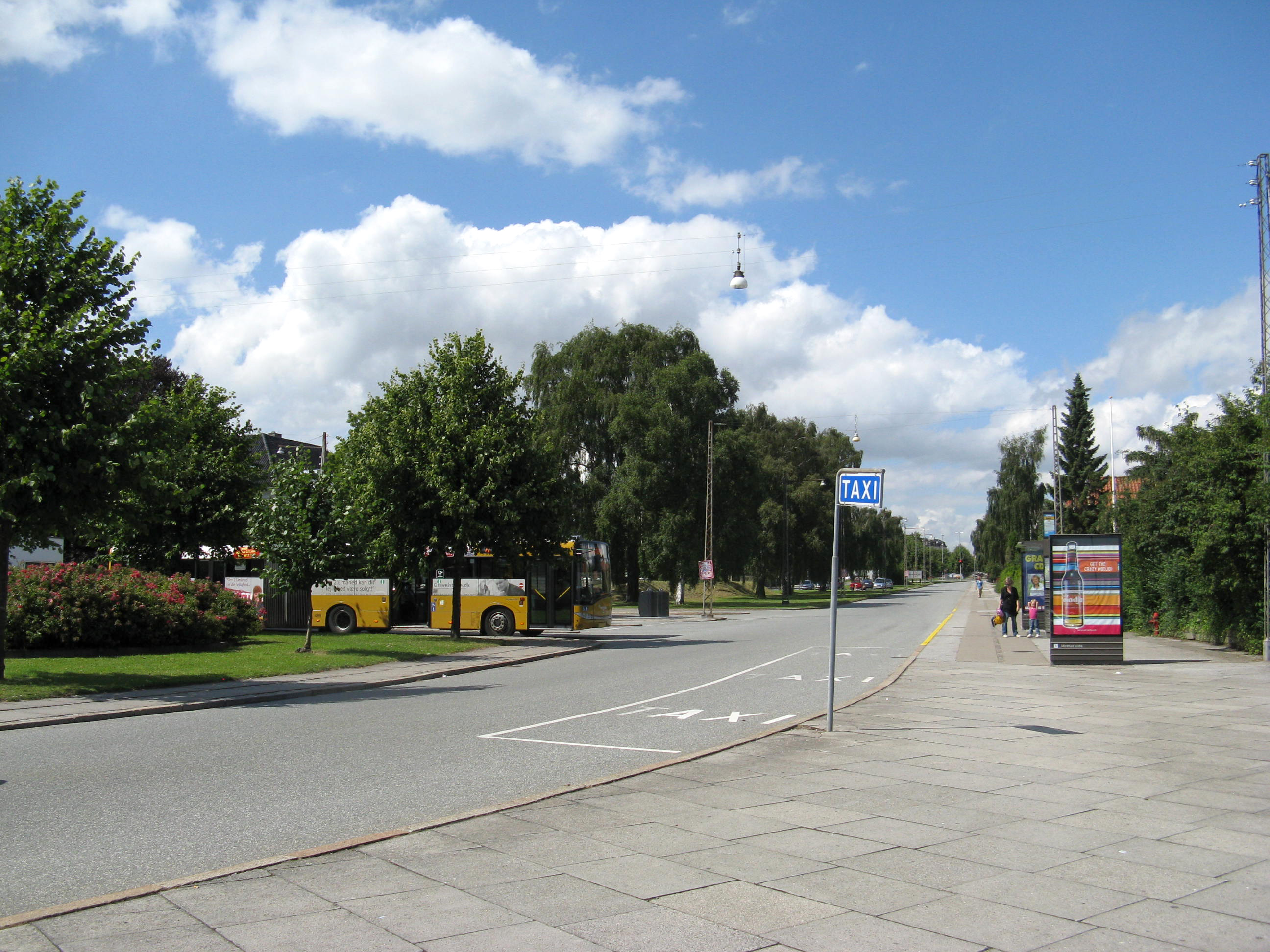 Dalgas Avenue set fra Filtenborg Plads, Aarhus, Denmark